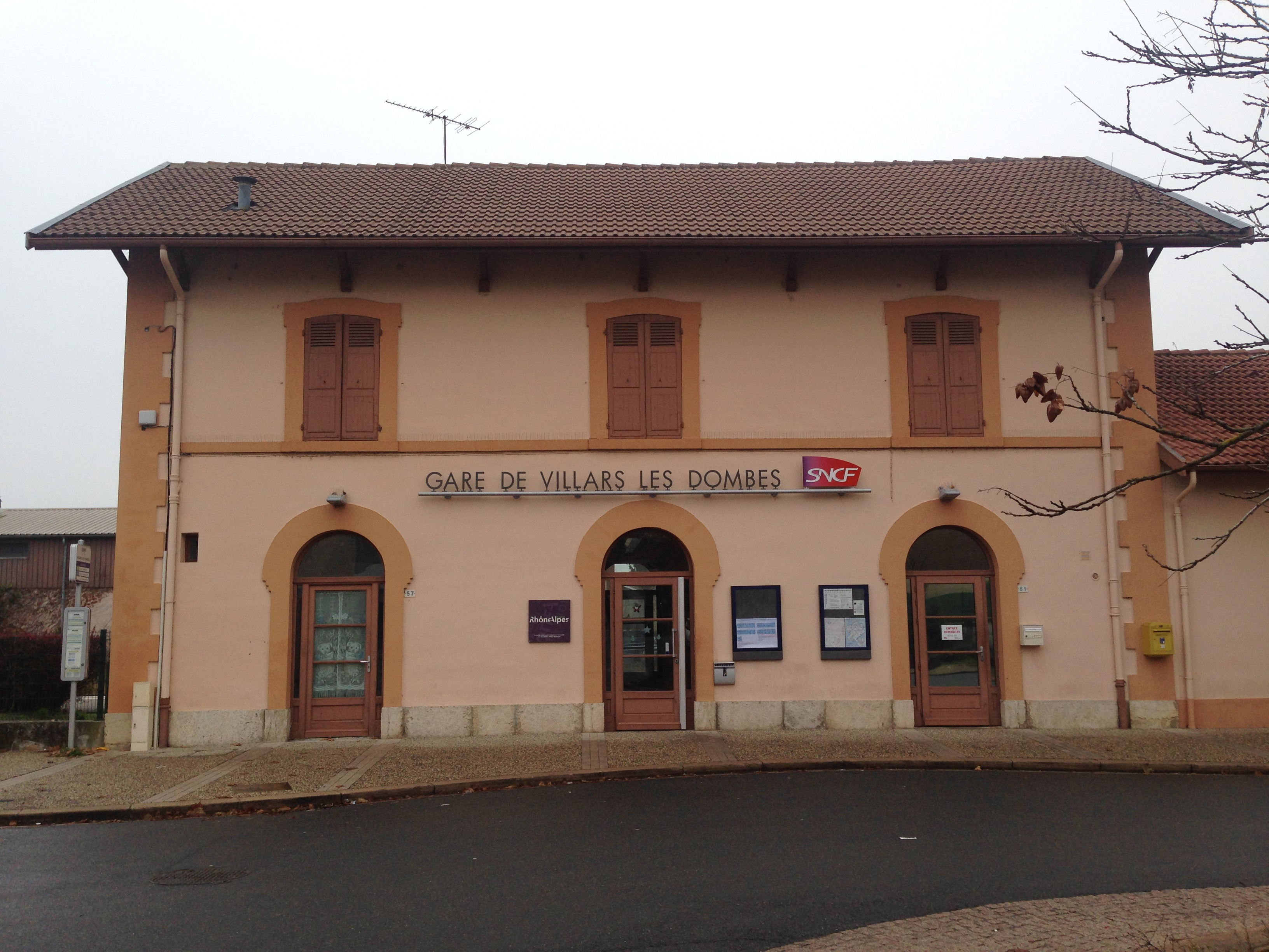 Gare de Villars-les-Dombes-2016